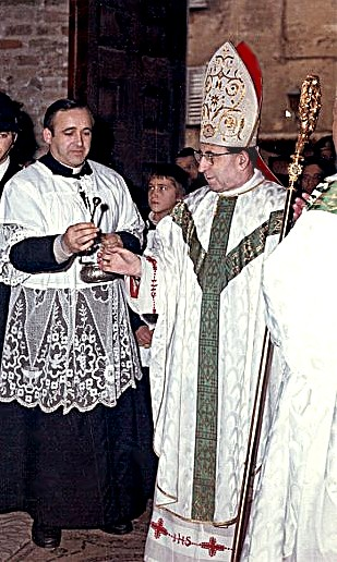 Monsignor Albino Luciani, futuro papa Giovanni Paolo I, all'epoca in cui era vescovo di Vittorio Veneto